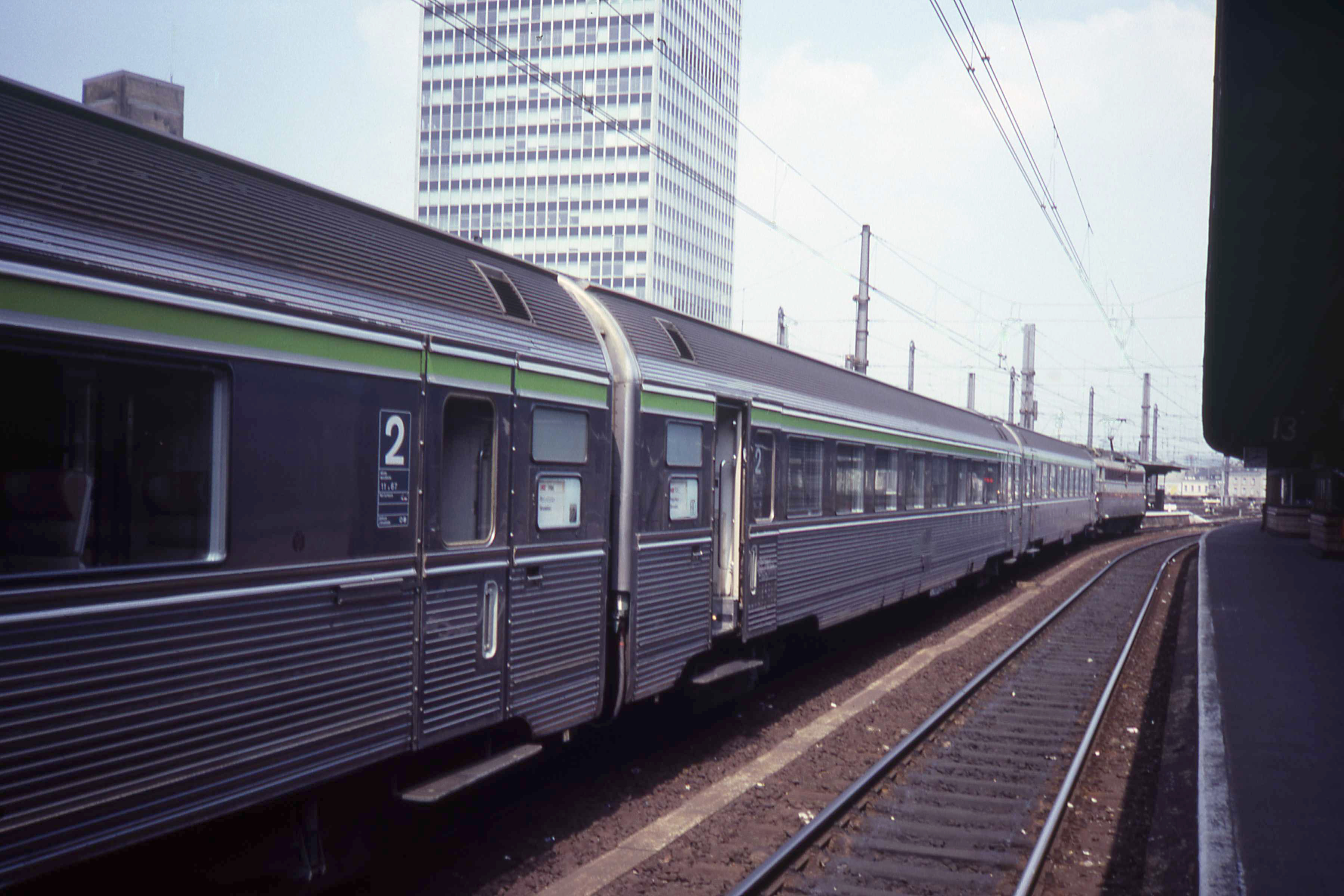 EC in Brussel Zuid met Inox rijtuigen